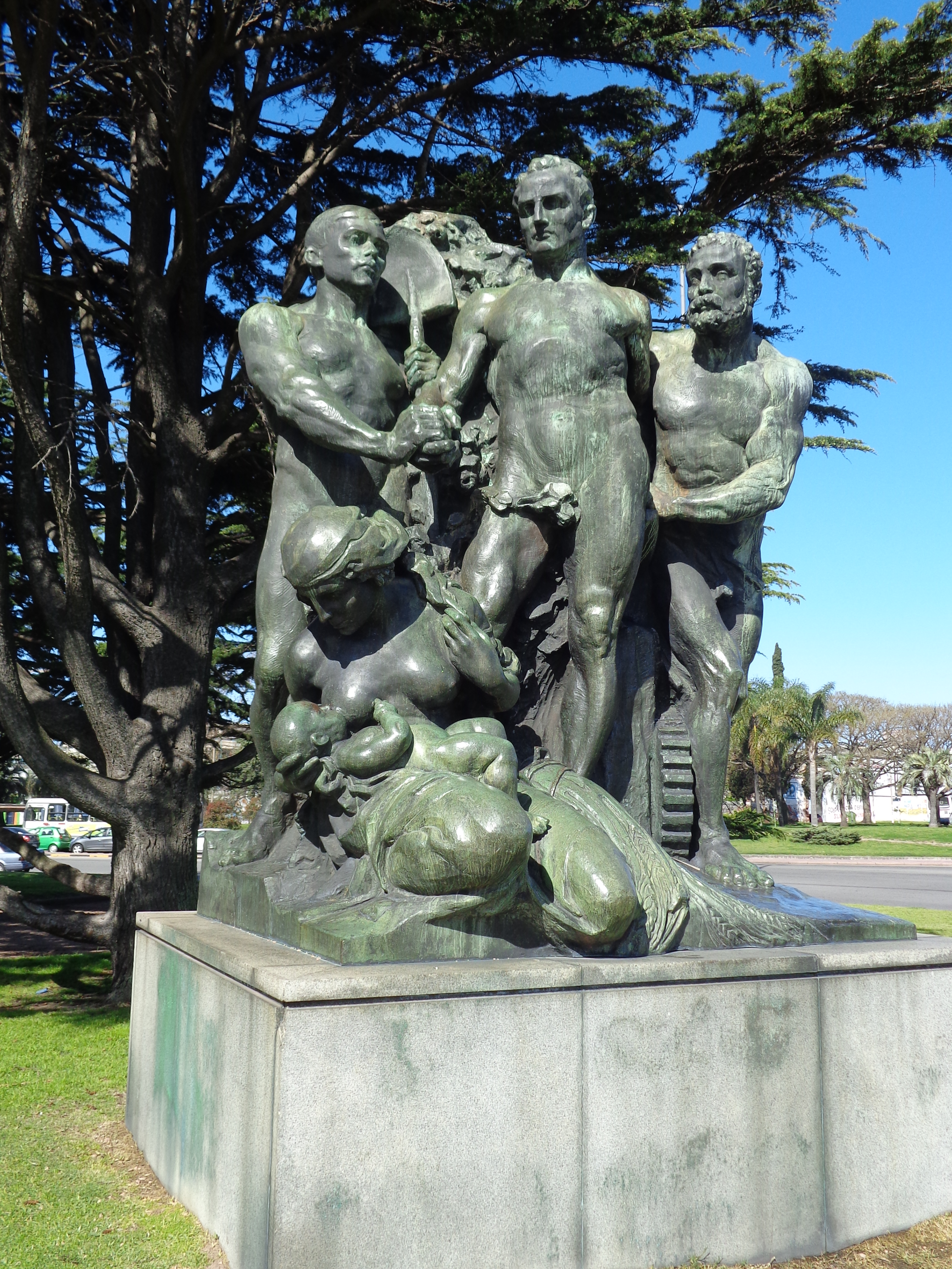 El trabajo (Palacio Legislativo). Ubicada en el departamento de Montevideo